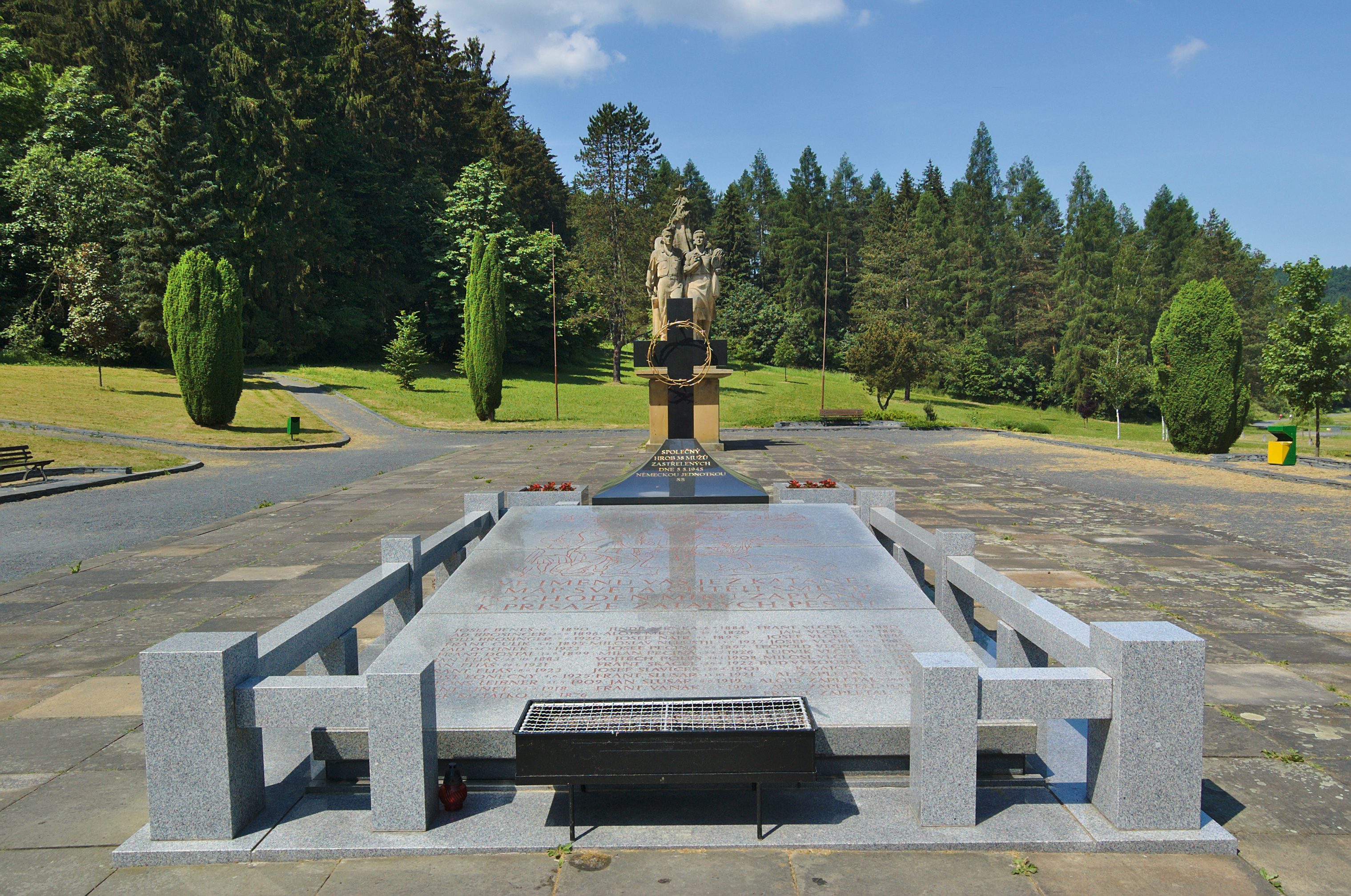 Památník obětem druhé světové války, Javoříčko, Luká, okres Olomouc